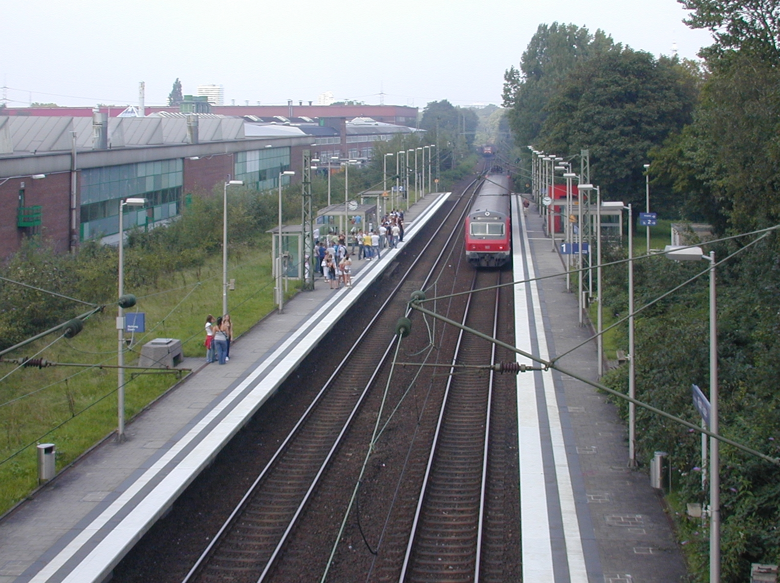 Gelsenkirchen-Rotthausen, die letzten Nachzügler auf dem Weg zur Loveparade 2007 in Essen